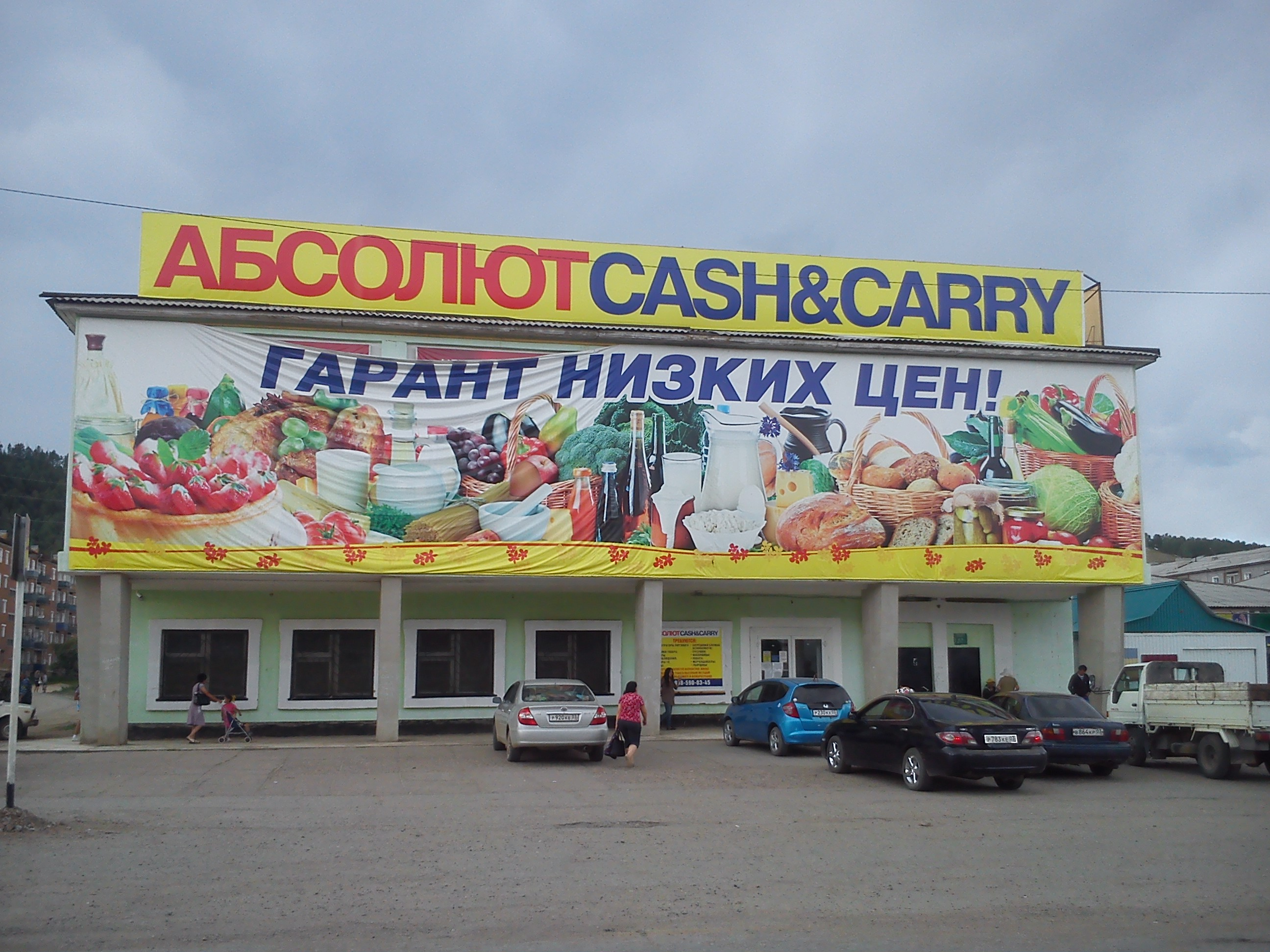 Супермаркет "Абсолют" в городе Закаменск.